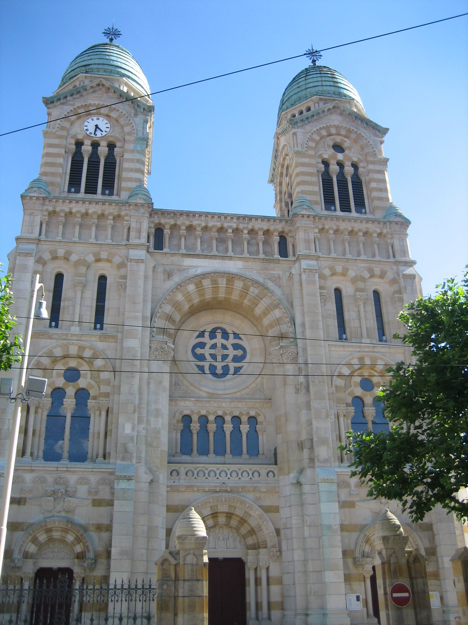 Façade de la basilique du Sacré-Coeur de Nancy (Meurthe-et-Moselle).